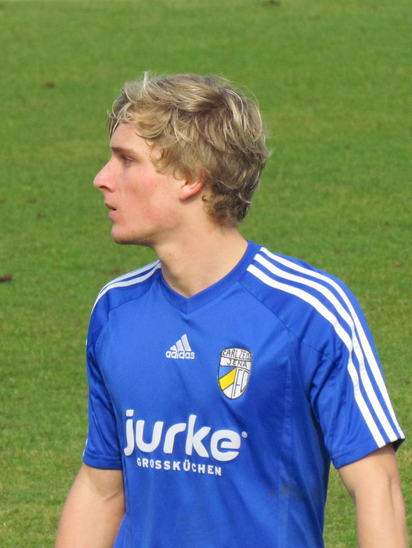 Tino Schmidt beim Punktspiel der A-Junioren des FC Carl Zeiss Jena gegen Dynamo Dresden